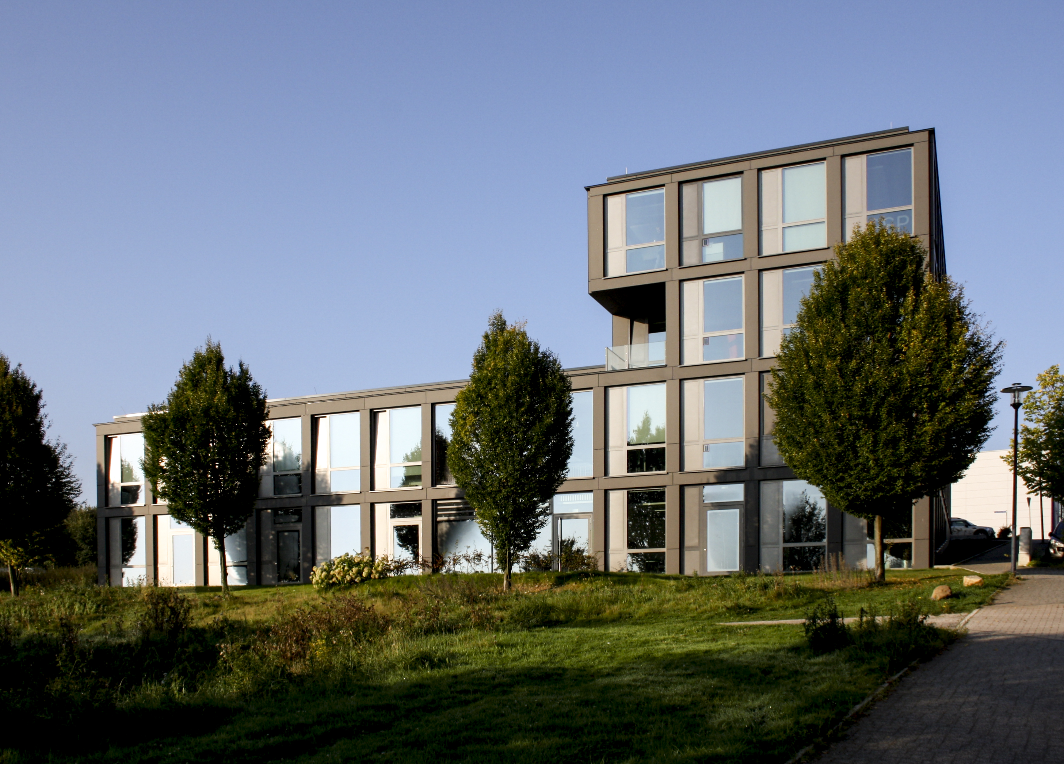 Mit dem Blick über das Ölbachtal markiert das Blue Office des Bochumer Planungsbüros SSP SchürmannSpannel AG den Eingang zum Technologiequartier Bochum Querenburg.